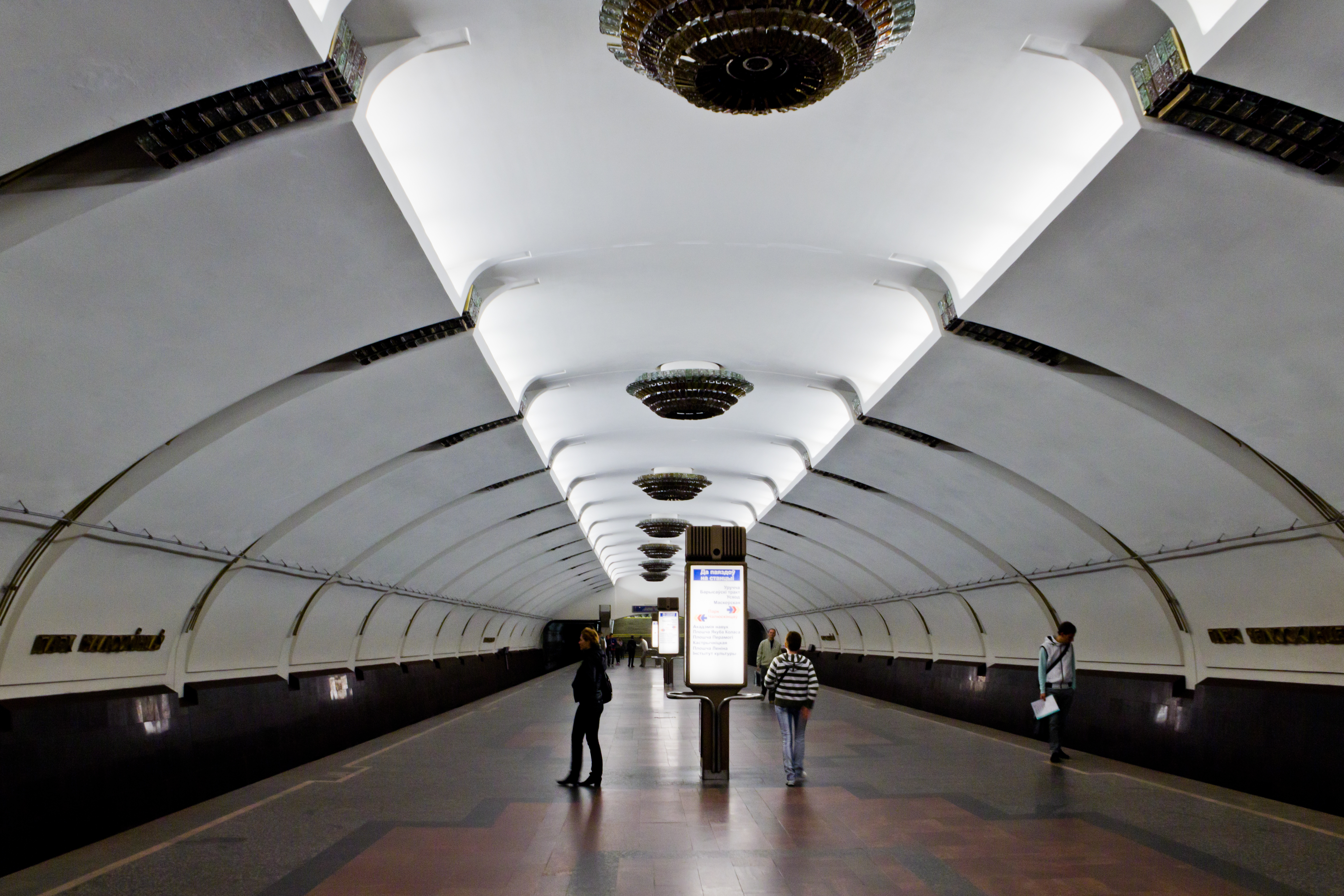 Станция метро «Парк Челюскинцев», Минск